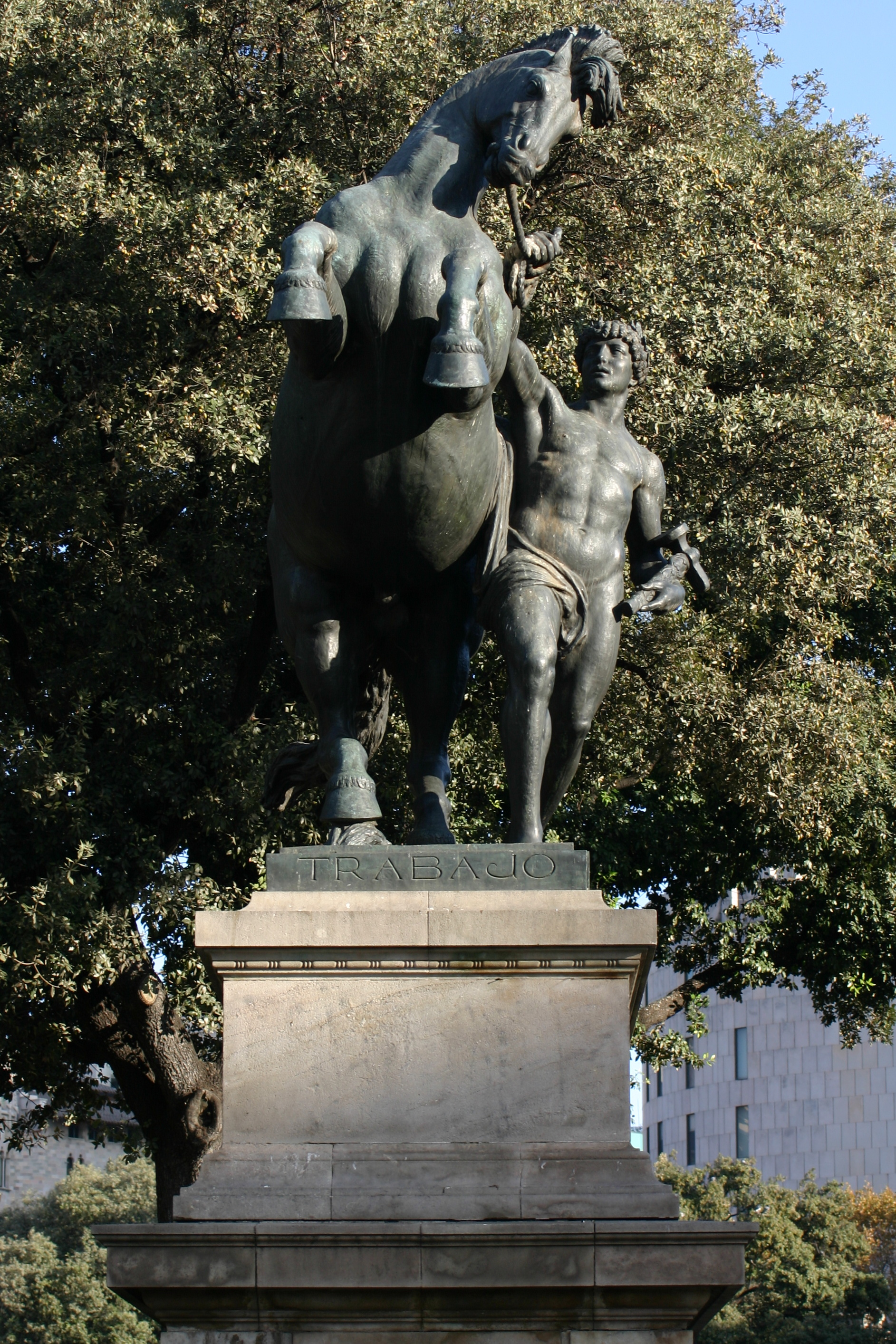 Treball. Plaza Catalunya. Barcelona (Spain)